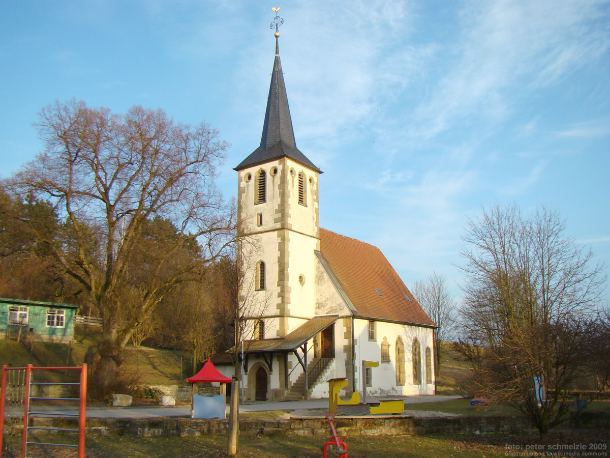 Kirche in Bad Rappenau-Trschklingen